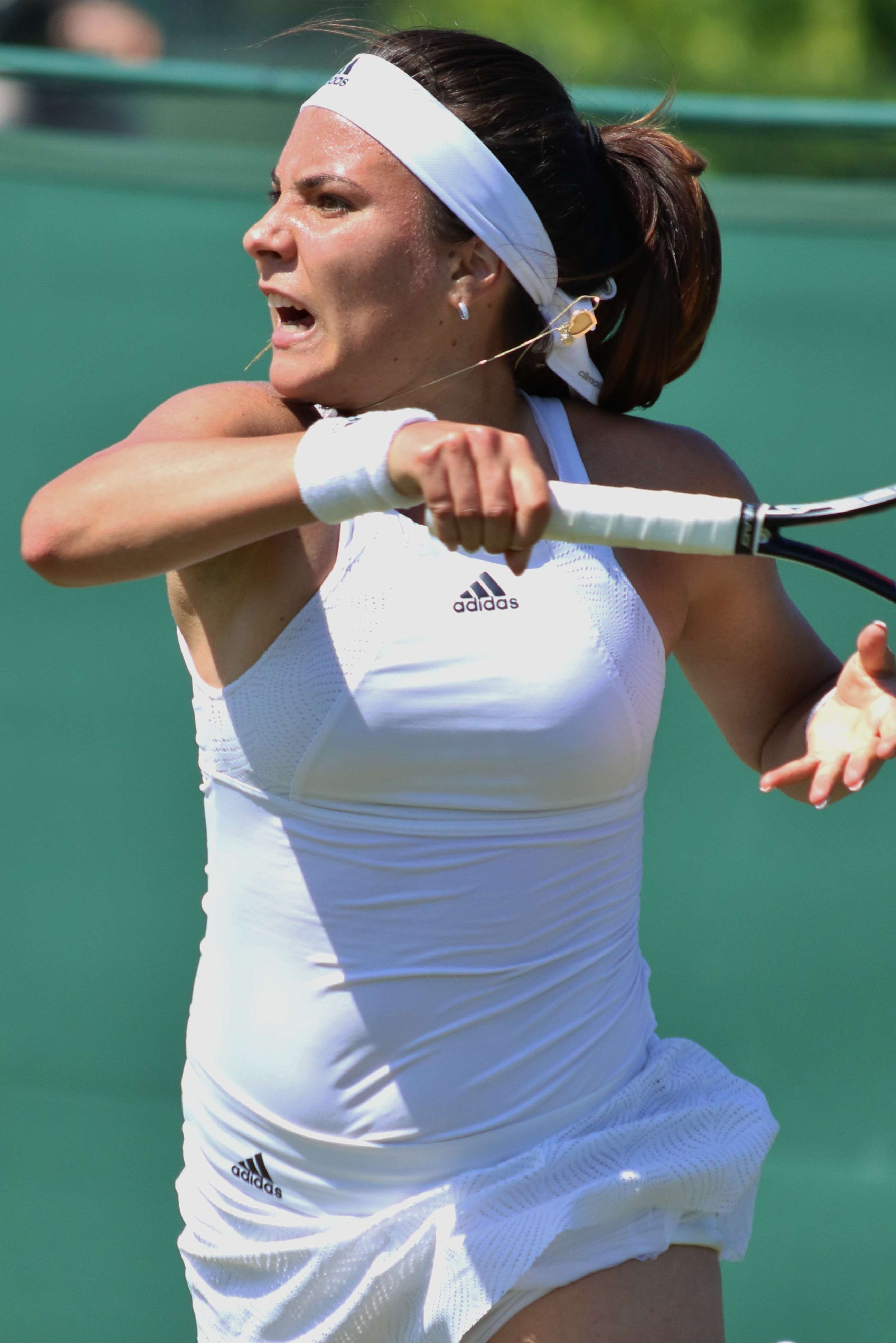 Ruse WMQ18 (28)